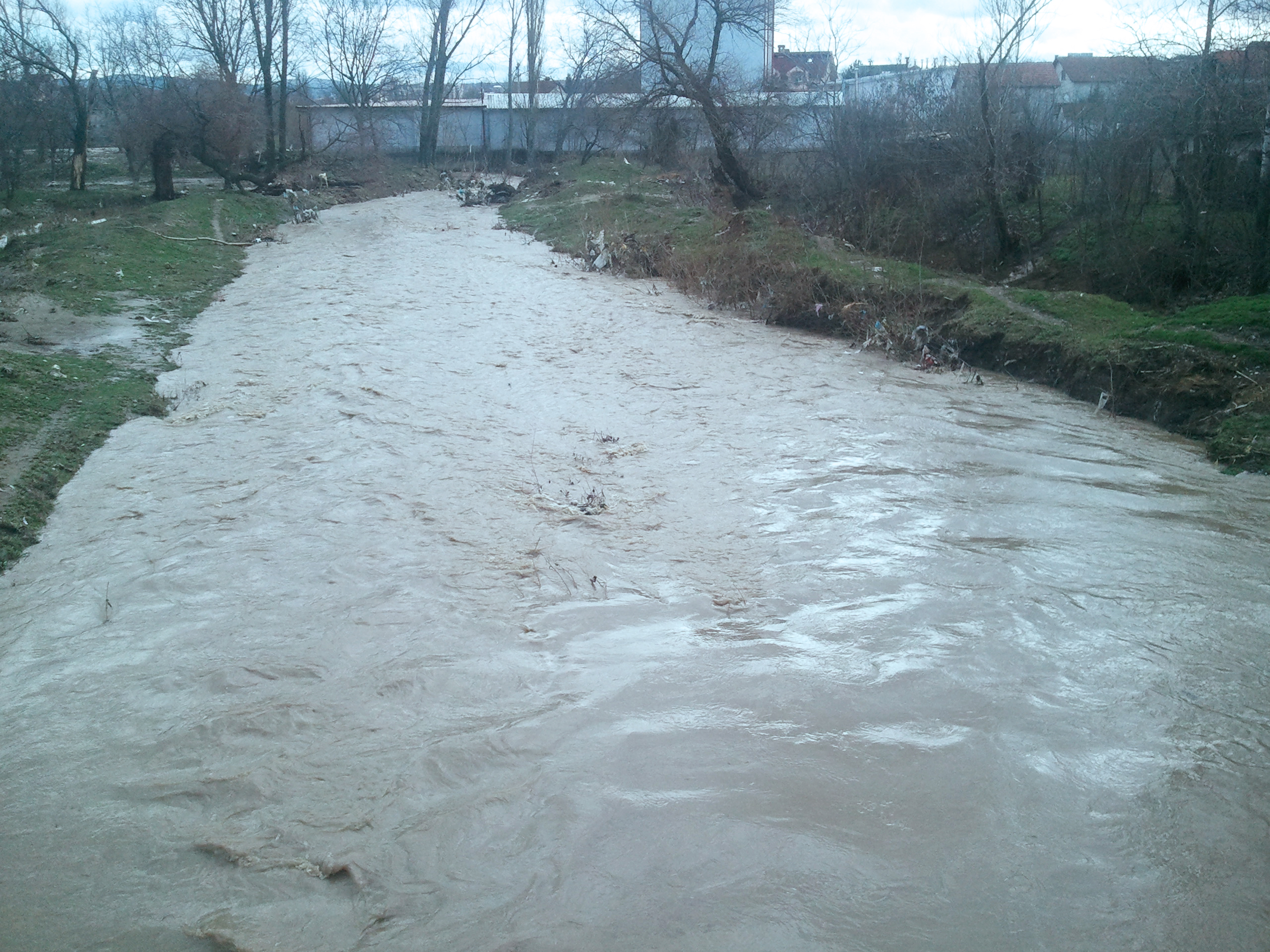 Којнарска река